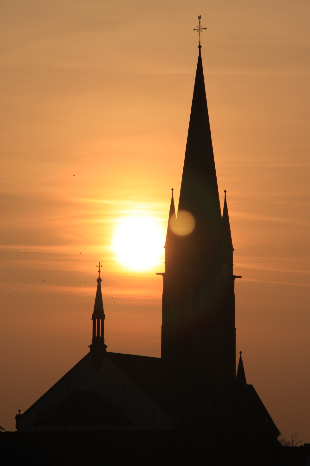 Sonnuntergang in Bellheim - Kirchturm der katholischen Kirche